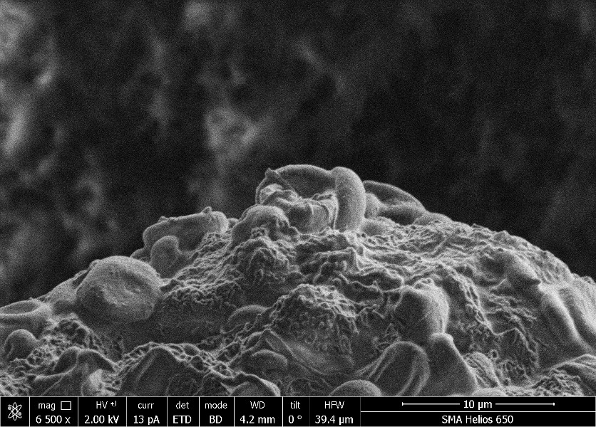 Фибриновый сгусток, полученный путем добавления тромбина в цельную кровь. Сканирующая электронная микроскопия. Автор разрешает публикацию этого изображения на правах свободной лицензии CC BY-SA 3.0